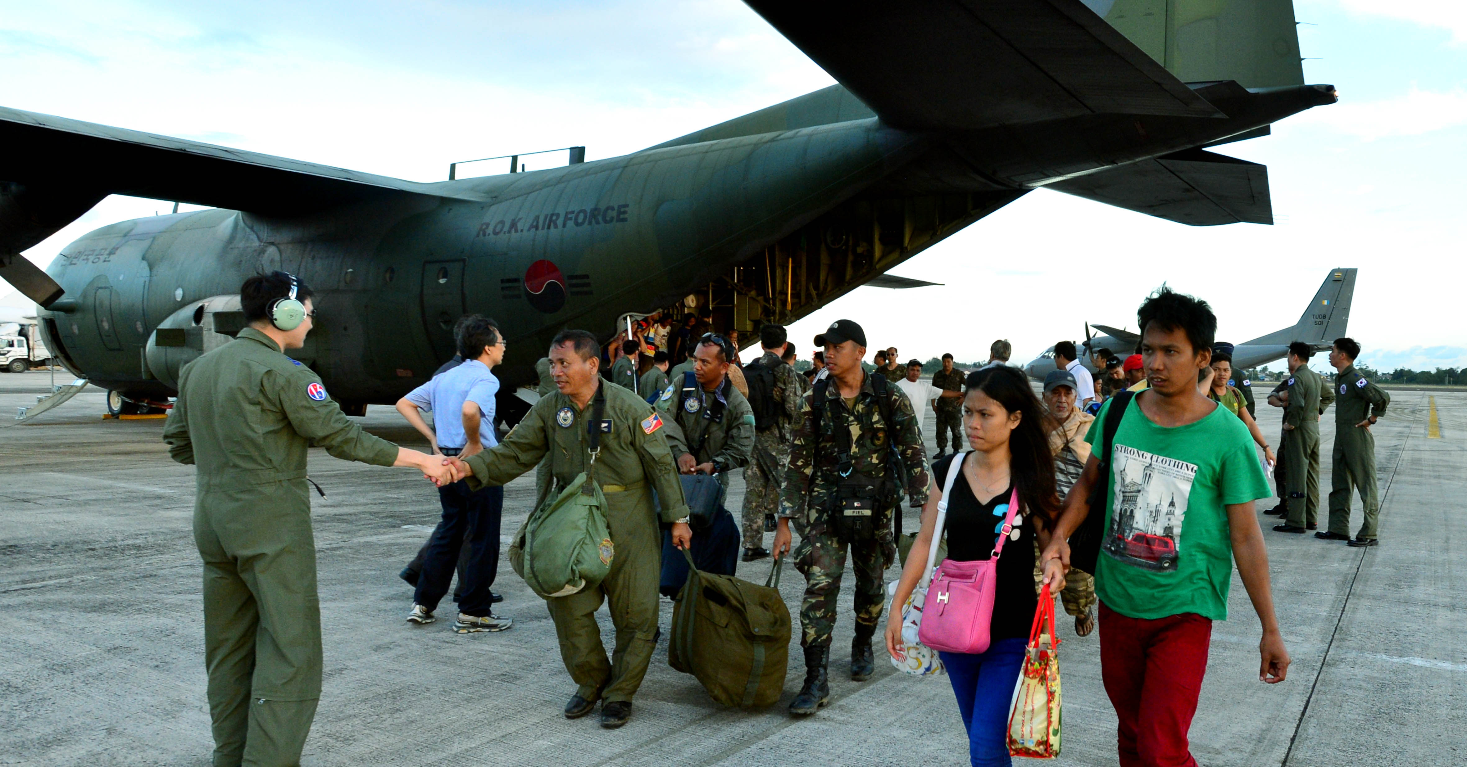 초대형 태풍 하이옌으로 도움이 절실한 필리핀을 지원하기위해 지난 16일부터 우리 정부에서 제공하는 구호물자와 구호인력을 싣고 공군 C-130 수송기 2대를 파견했다. 이를 위해 공군15특수임무비행단을 중심으로 46명으로 구성된 구호팀은 구호물자를 하역한 후 현지에 마지막으로 남아있던 우리 교민과 현지 이재민 등 100여 명을 C-130 수송기에 태우고 세부 막탄 공항으로 옮겼다. 우리 공군이 해외 임무 수행 중 해외 이재민들을 직접 수송한 것은 이번이 처음이다. 공군 구호팀은 하루 2∼4차례 세부와 타클로반을 오가며 임무를 수행하고 있다.